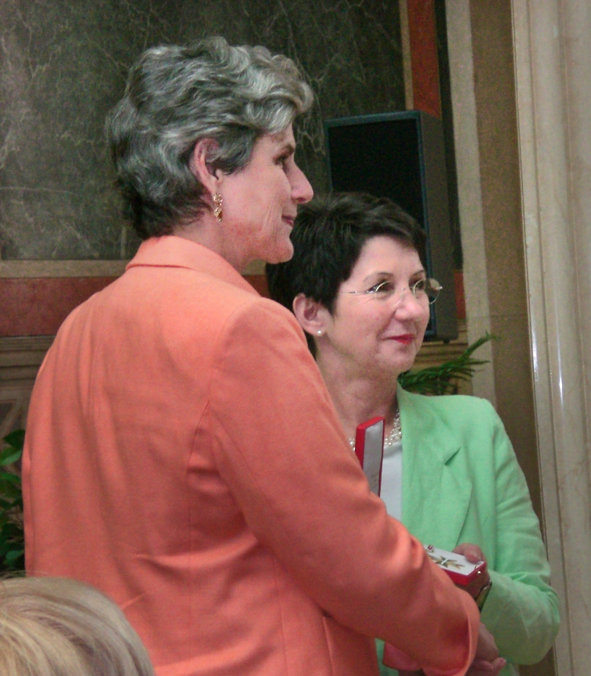 Barbara Rosenkranz erhält das Große Goldene Ehrenzeichen für Verdienste um die Republik Österreich am 19. Juni 2007 von Nationalratspräsidentin Barbara Prammer.